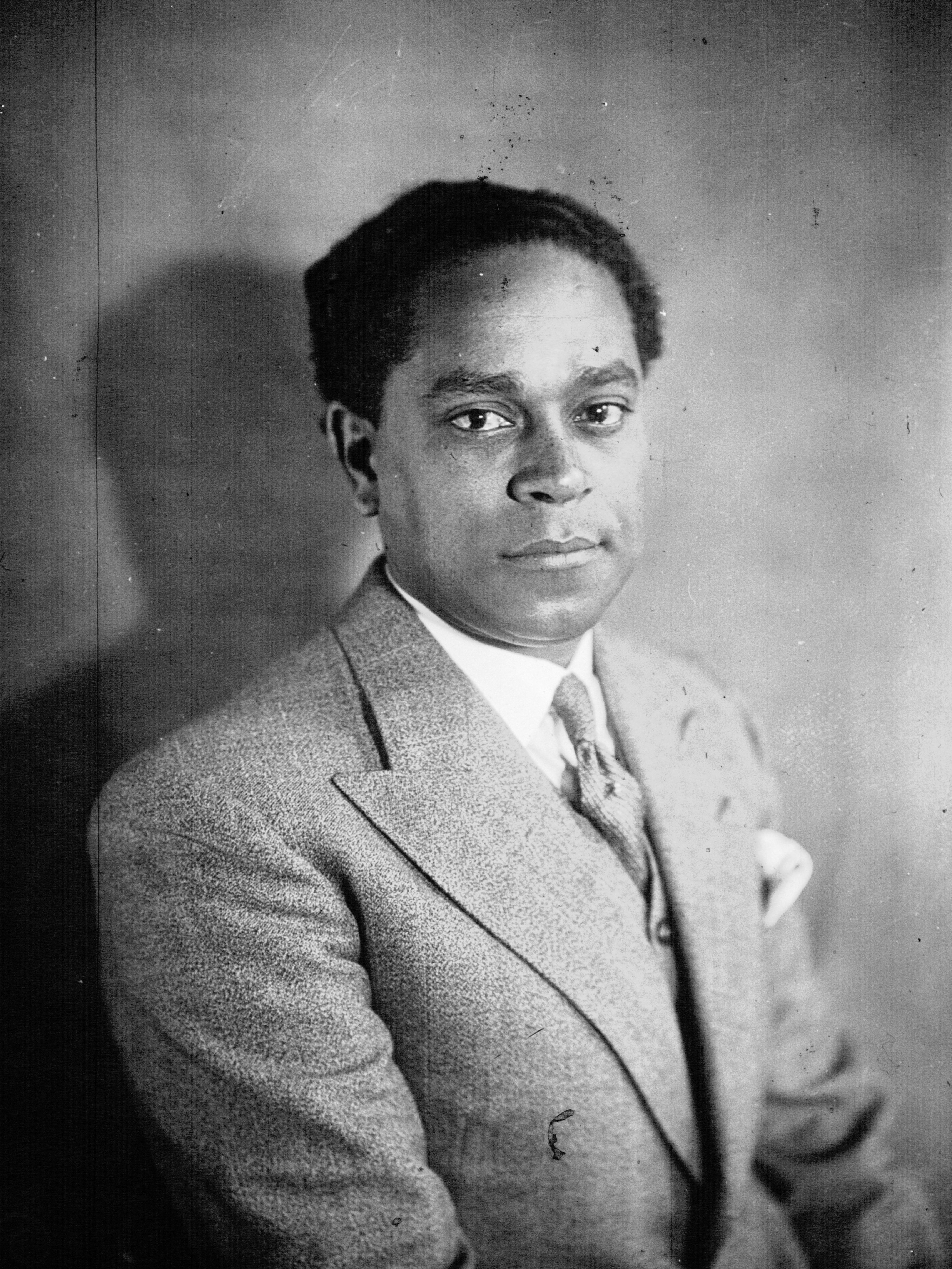 Moneville [sic], député de Guyane : photographie de presse